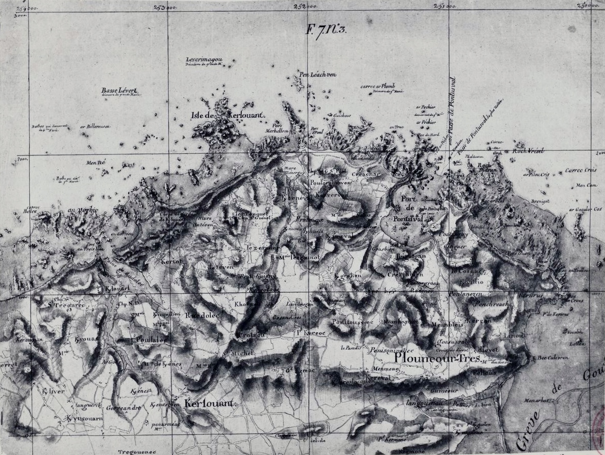 Carte de la région de Plounéour-Trez et Kerlouan publiée entre 1771 et 1785 (Bibliothèque nationale de France, département Cartes et plans, GESH18PF43DIV3P92D)